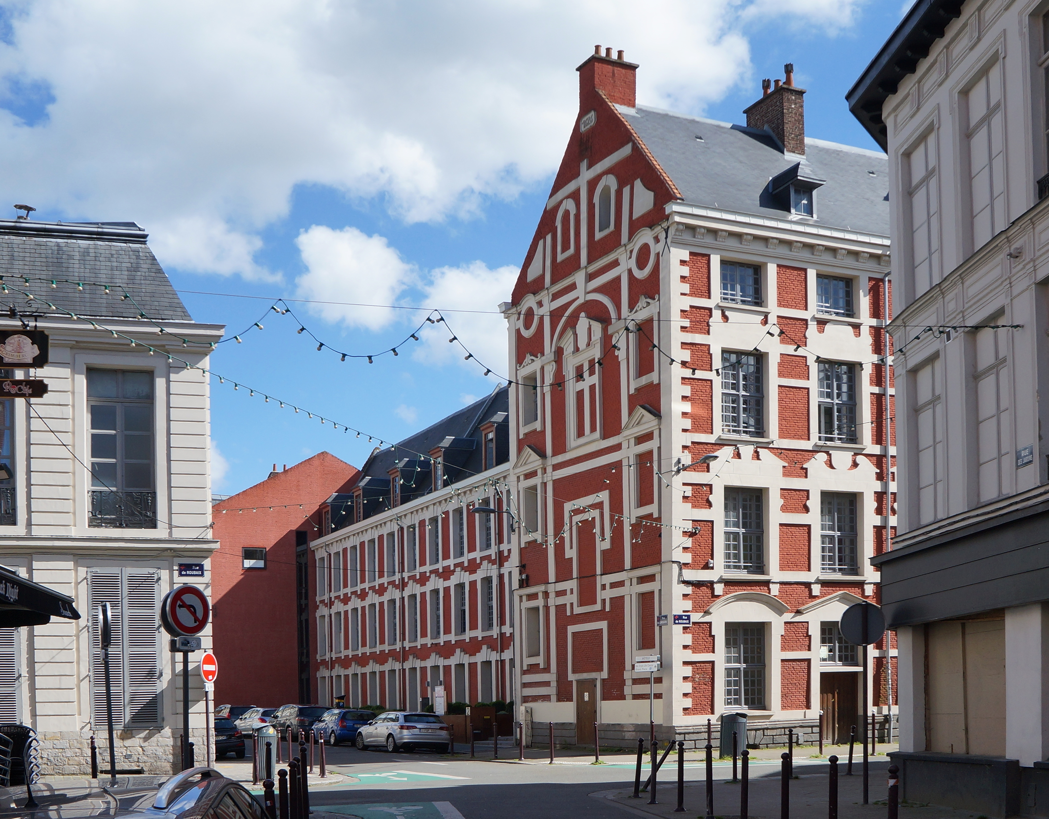 Ecole des arts industriels et des mines (Ecole centrale de Lille) , Rue du Lombard (Lille) Lille Nord (département français)